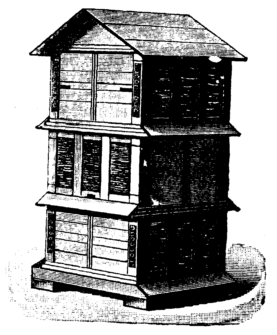 Stapel af Dzierzons tvillingkupor.